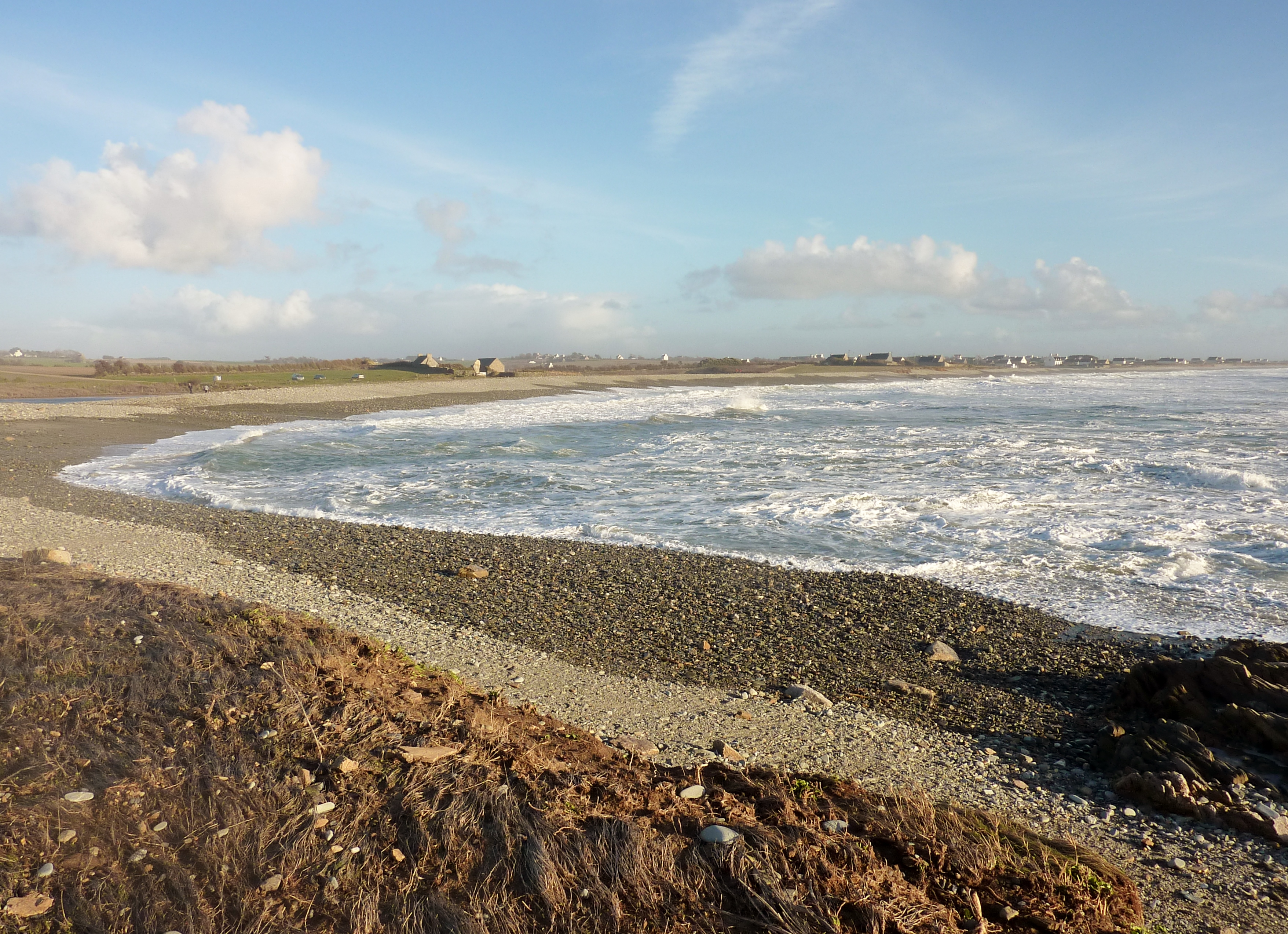 Plozévet : l'anse de Canté, ancien port de pêche ne formant qu'un abri précaire, abandonné depuis les années 1950.